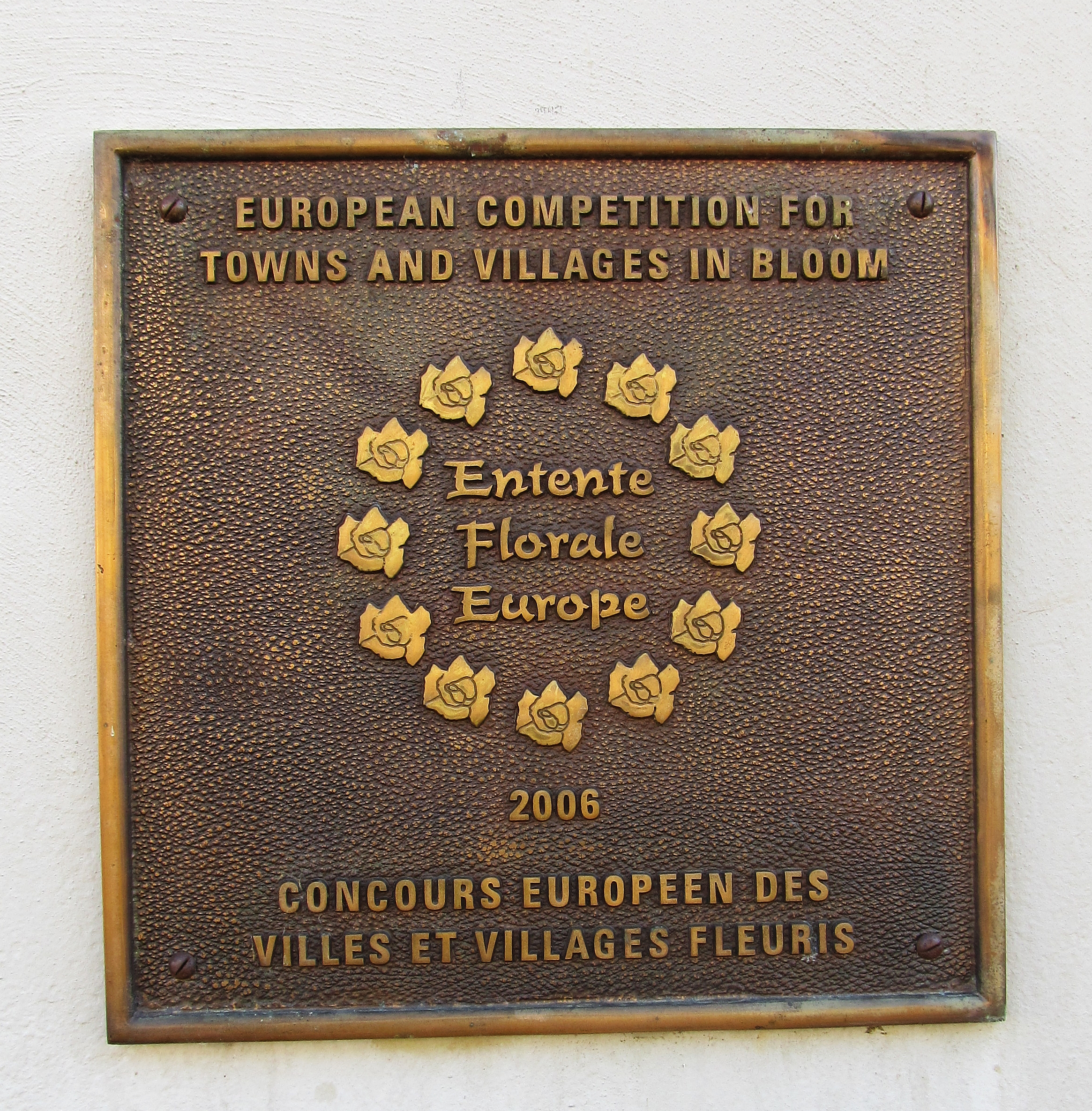 Eguisheim (Alsace, France): plaque commémorative de la victoire dans le concours européen (éd.2006) des villes et villages fleuris (Entente florale).